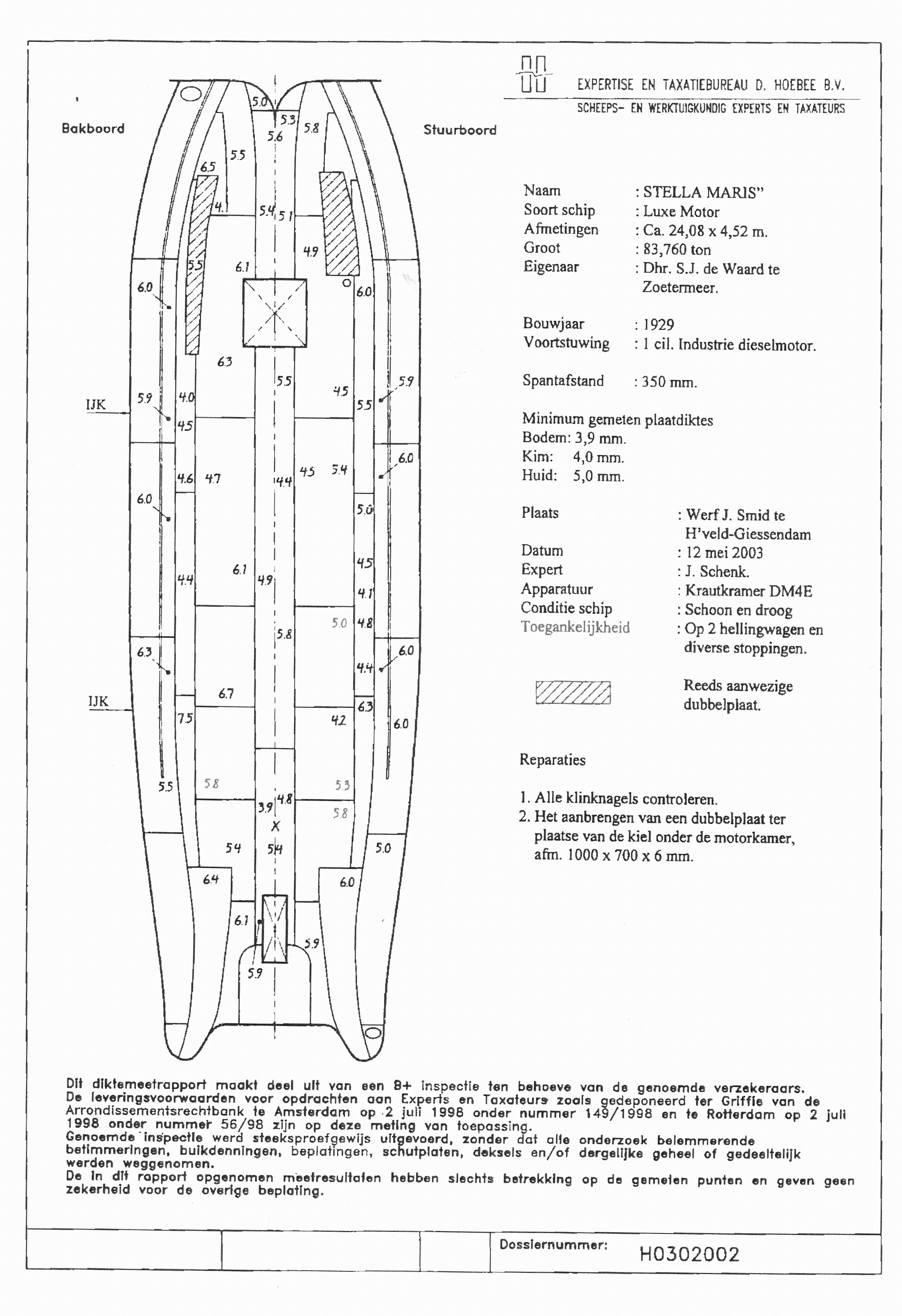 Vlakmeting Stella Maris.